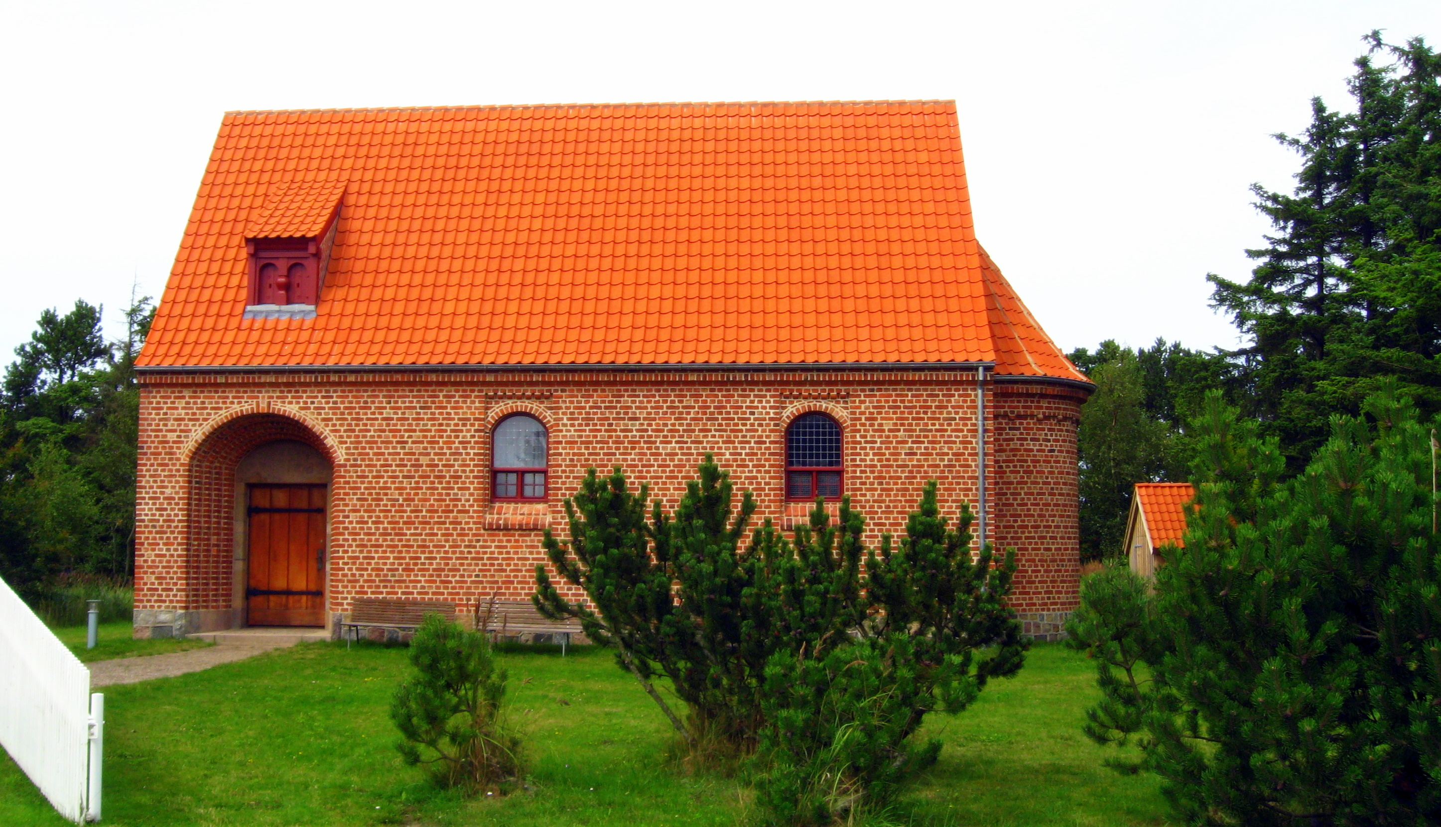 Rødhus Kirke, Hune Sogn, Jammerbugt Kommune